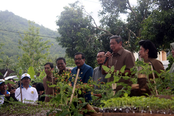 Presiden SBY bersama Ibu Hj Ani Yudhoyono, didampingi Menteri Pertanian, Gubernur Jatim, Bupati Pacitan, dan Kepala Badan Litbang Pertanian saat memberikan arahan di lokasi Kebun Bibit Desa Kawasan Rumah Pangan Lestari (KBD-KRPL) Desa Kayen, Pacitan, Jumat (12/1/2012) siang.